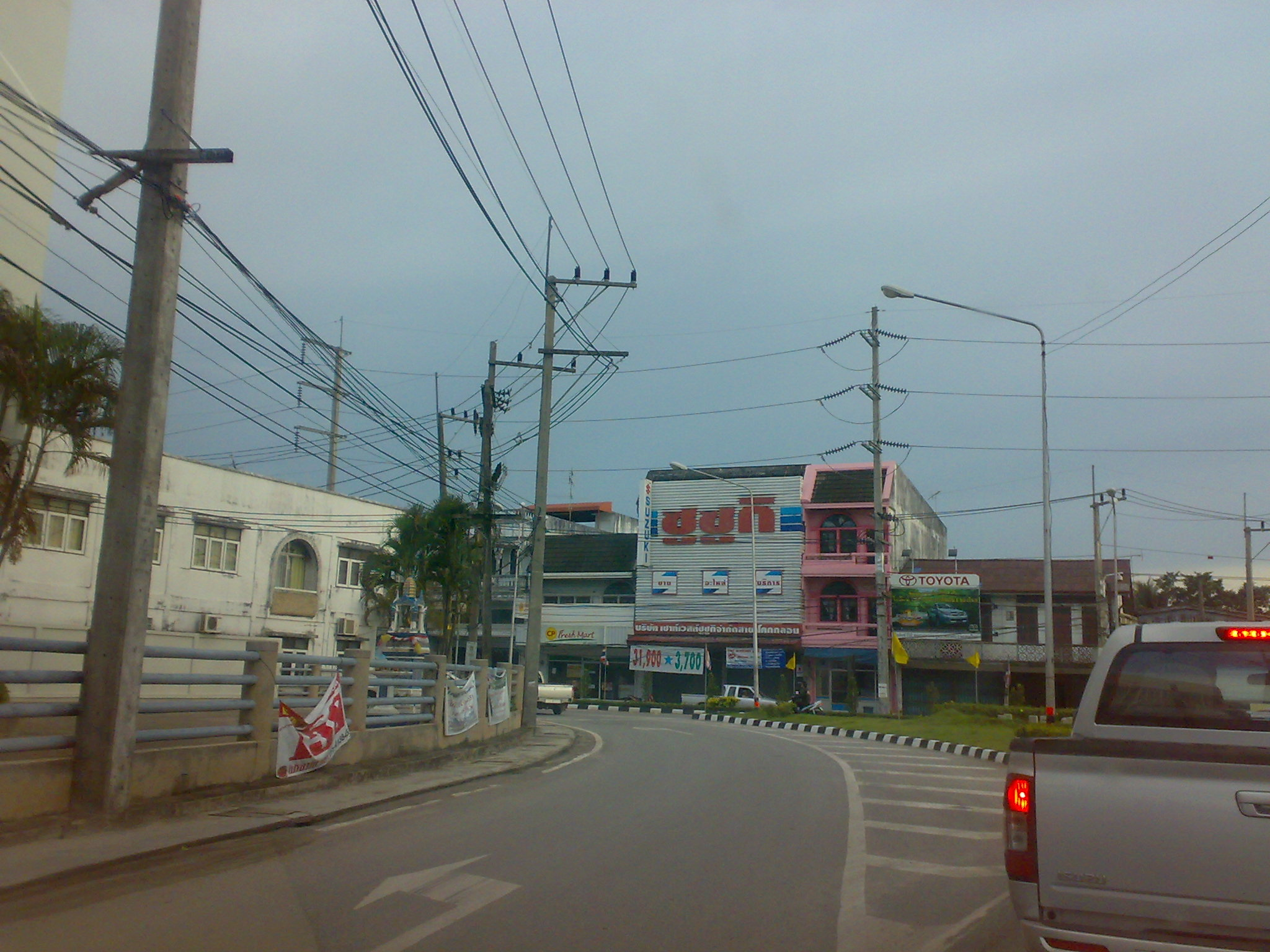 Khok Kloi, Takua Thung, Phang Nga, Thailand